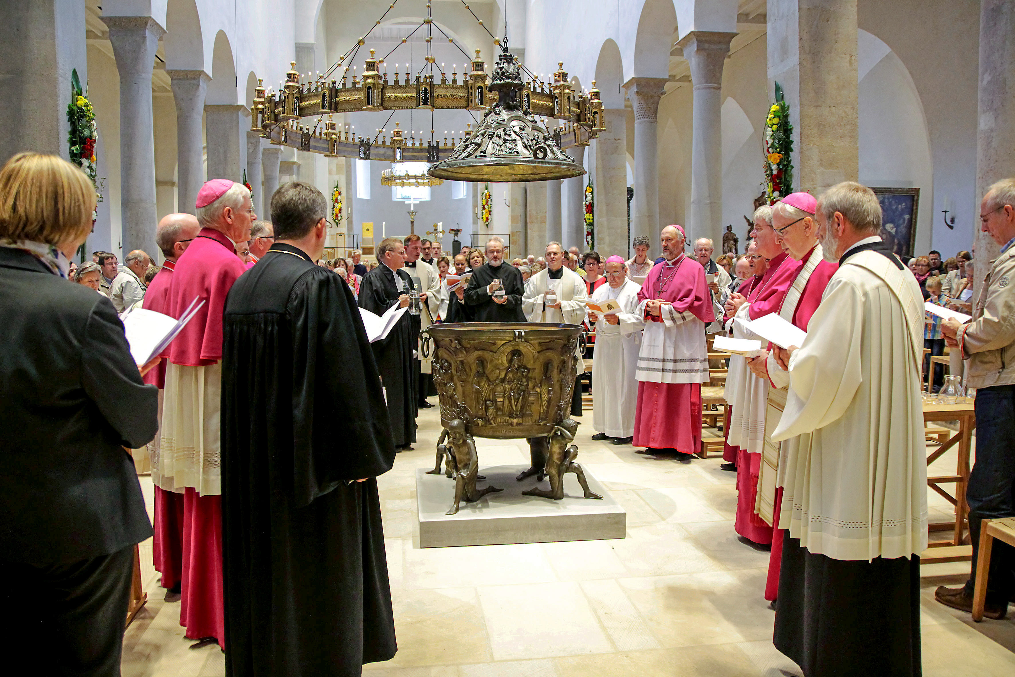 Ökumenische Taufvesper im Hildesheimer Dom am Tag nach der Wiedereröffnung, 16. August 2014